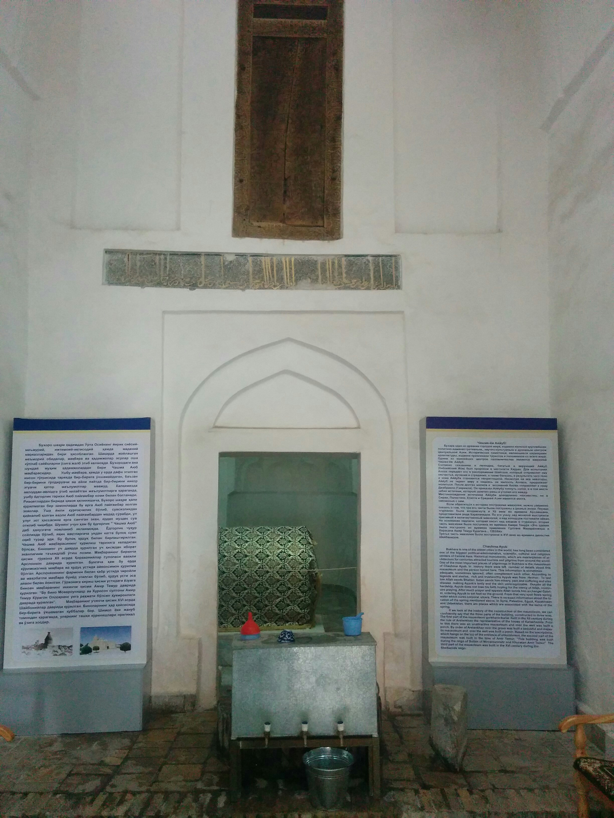 Ichki qismi